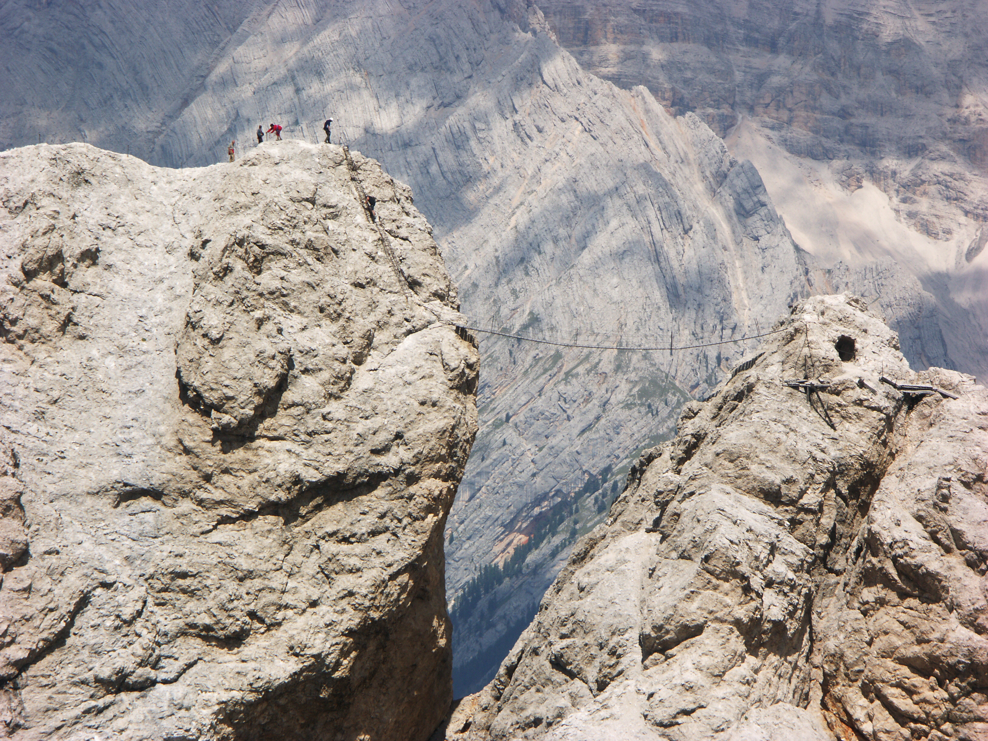 Seilbrücke (Hängebrücke) auf der Via Ferrata Dibona zum Rifugio Lorenzi am Monte Cristallo